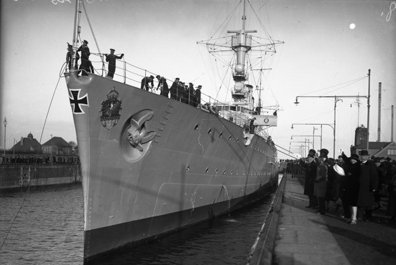 Kreuzer Emden im Hafen von Kiel.